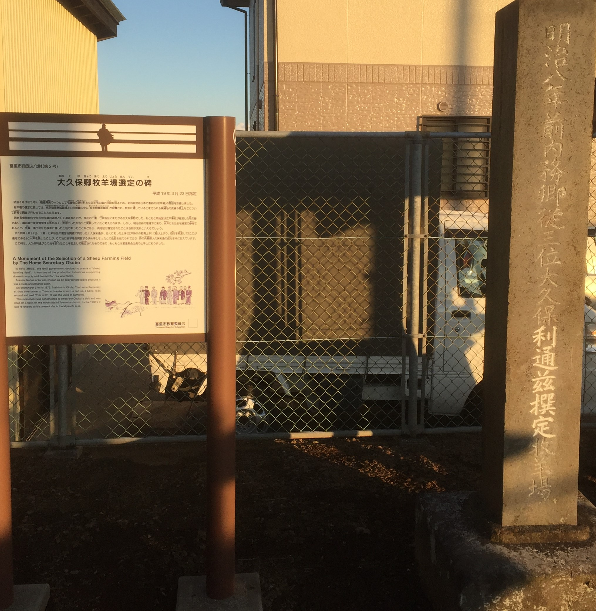 富里市両国地区にて撮影